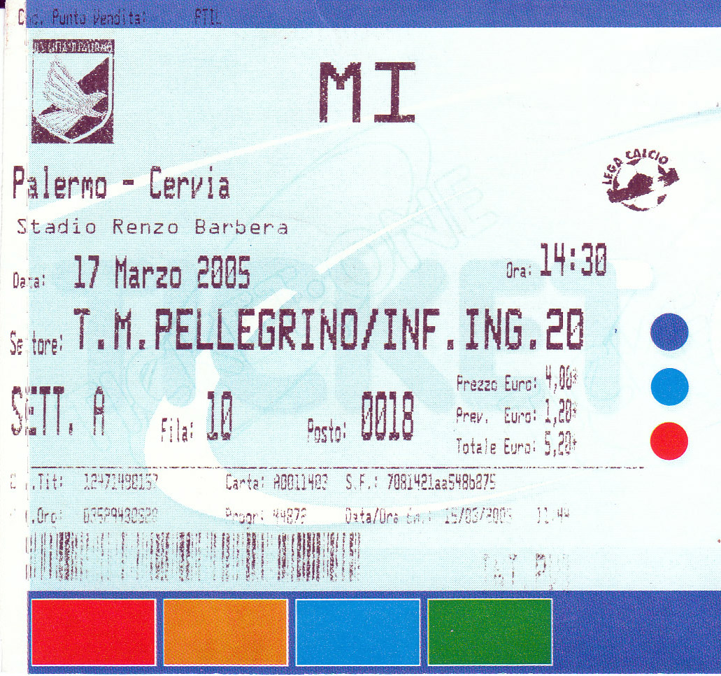 Biglietto della partita amichevole Palermo-Cervia del 17 marzo 2005